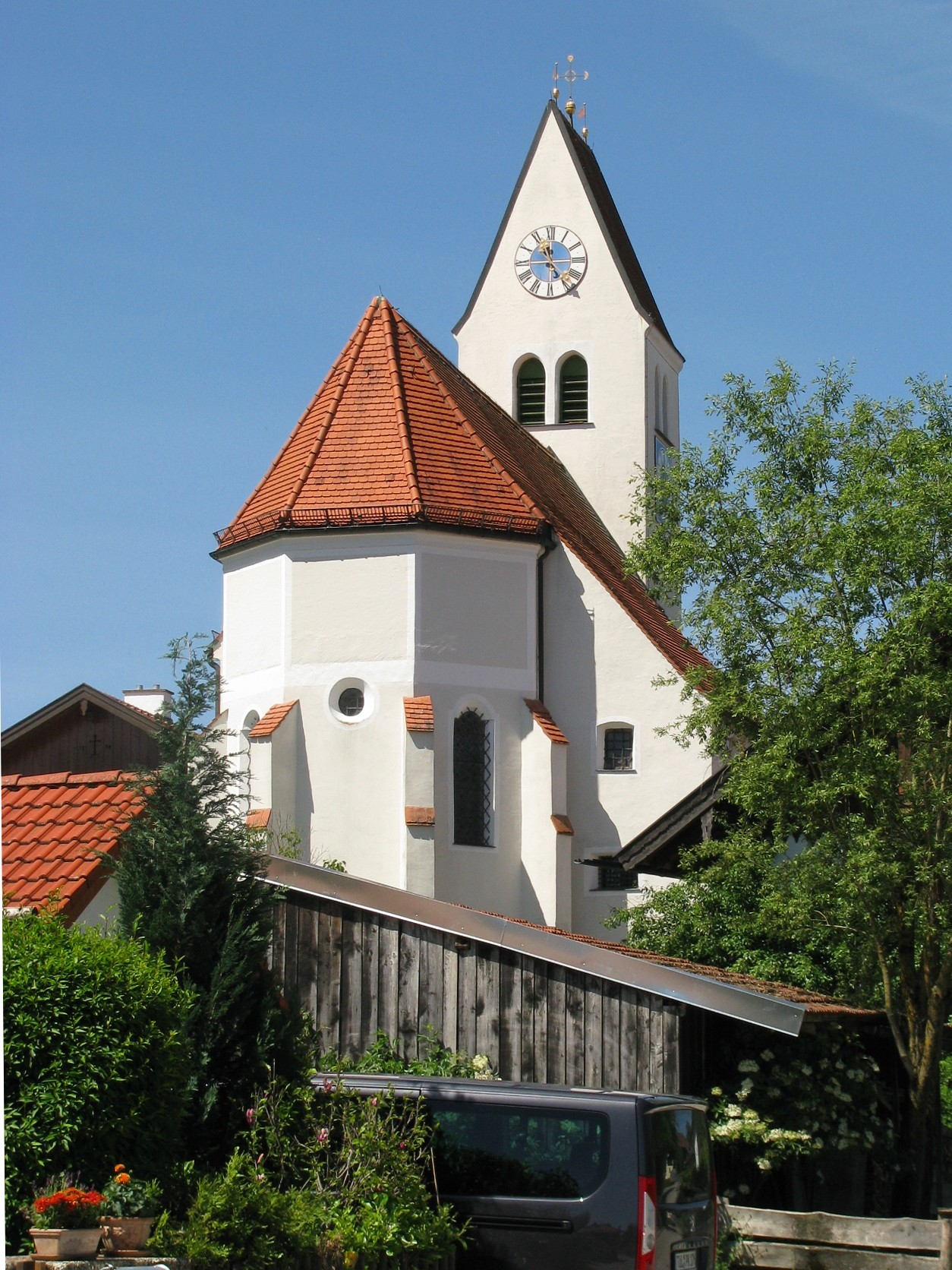 Kath. Filialkirche (Kuratiekirche) Mariä Himmelfahrt in Ergertshausen, Gemeinde Egling; 2. Hälfte 15. Jh., Langhaus barock erhöht, Westturm aus Tuffquadern; Ansicht von Osten